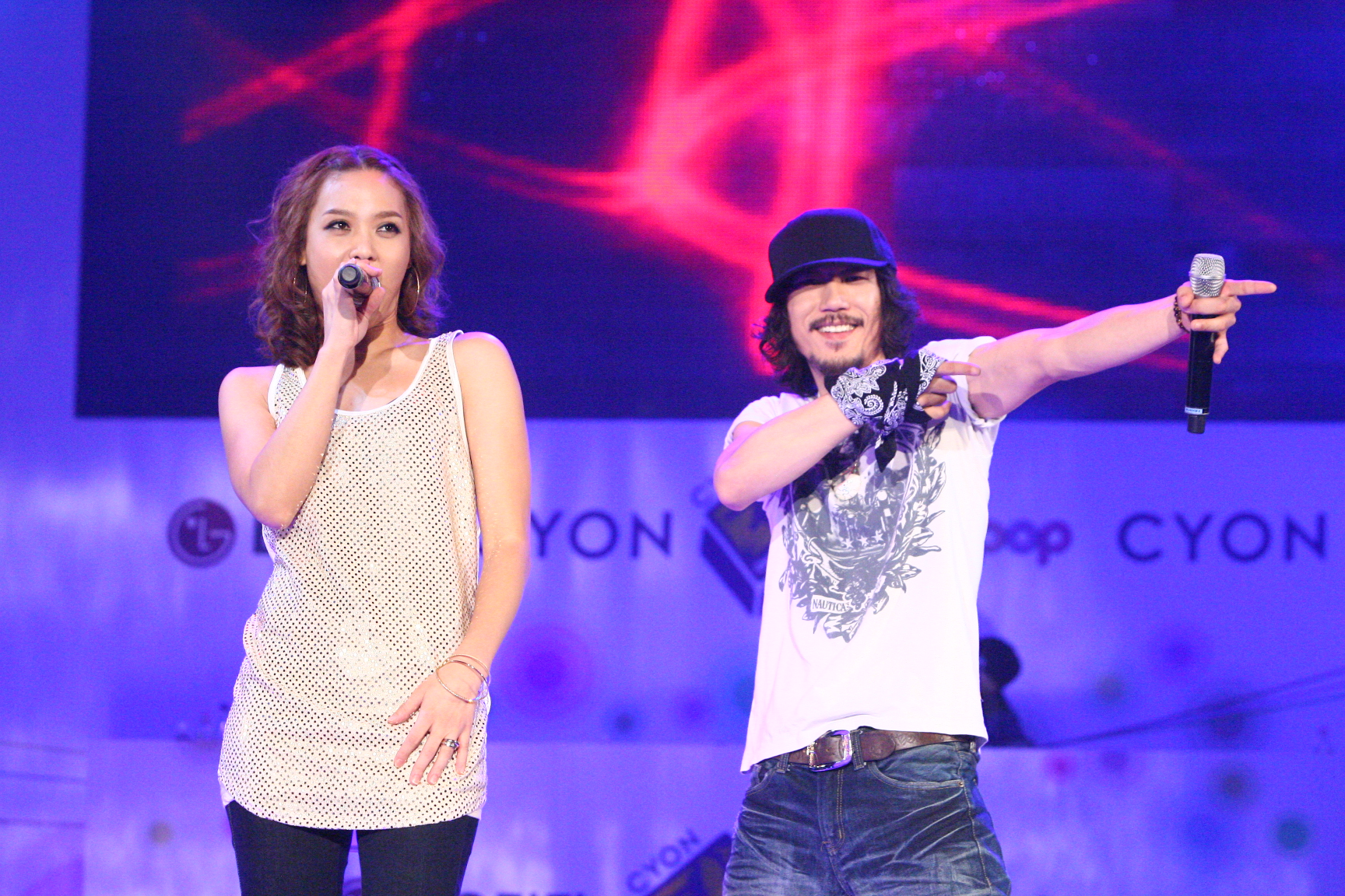 LG전자, ‘CYON 비보이 챔피언십 2010’ 본선 개최